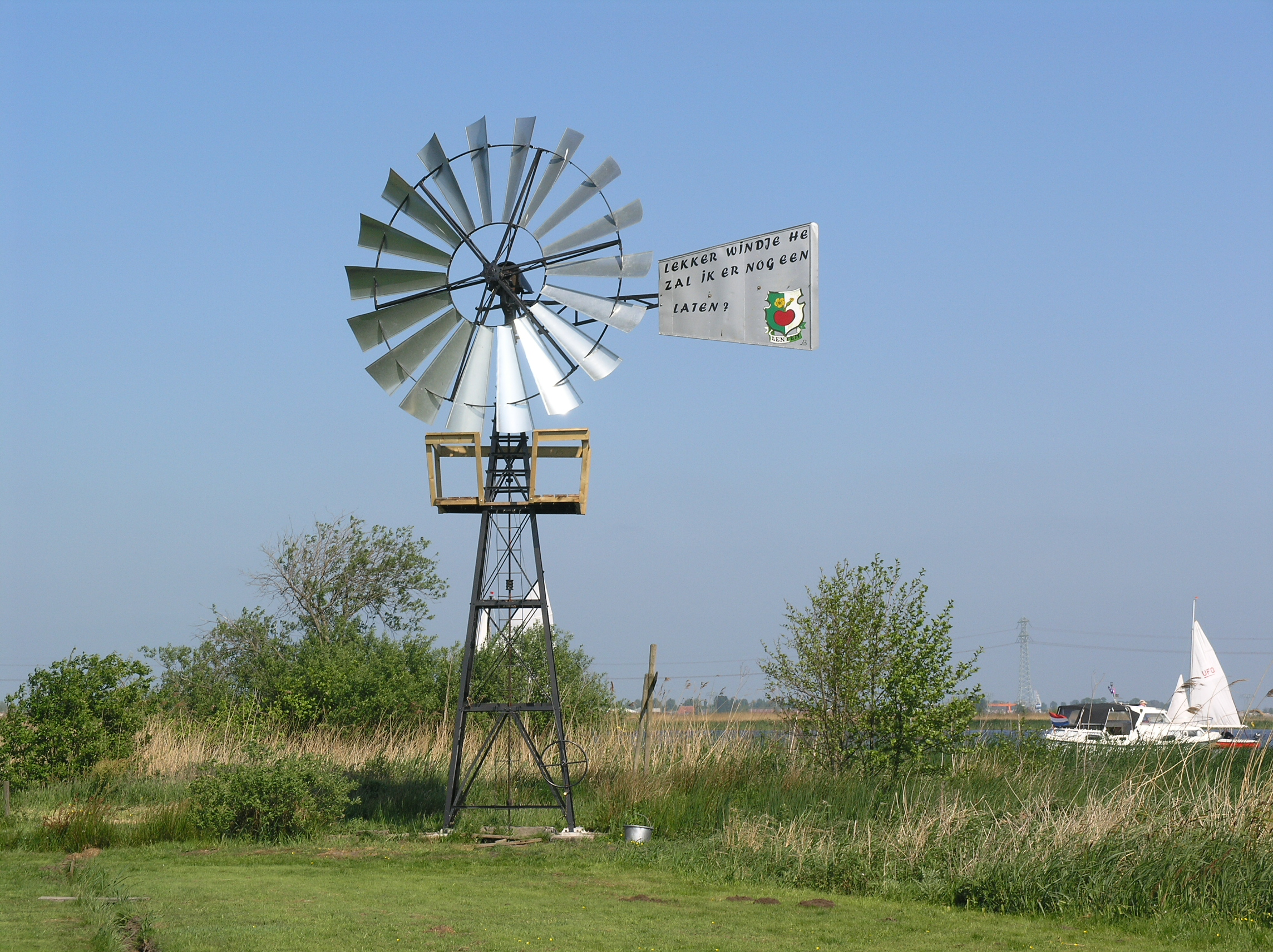 Terherne Windmotor op Kamelion eiland